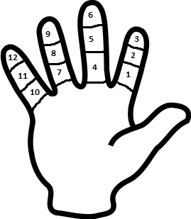 Russian duodecimal finger through the system (Русский пальцевый счёт двенадцатеричной системы)